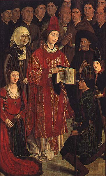 Pintura de Nuno Gonçalves